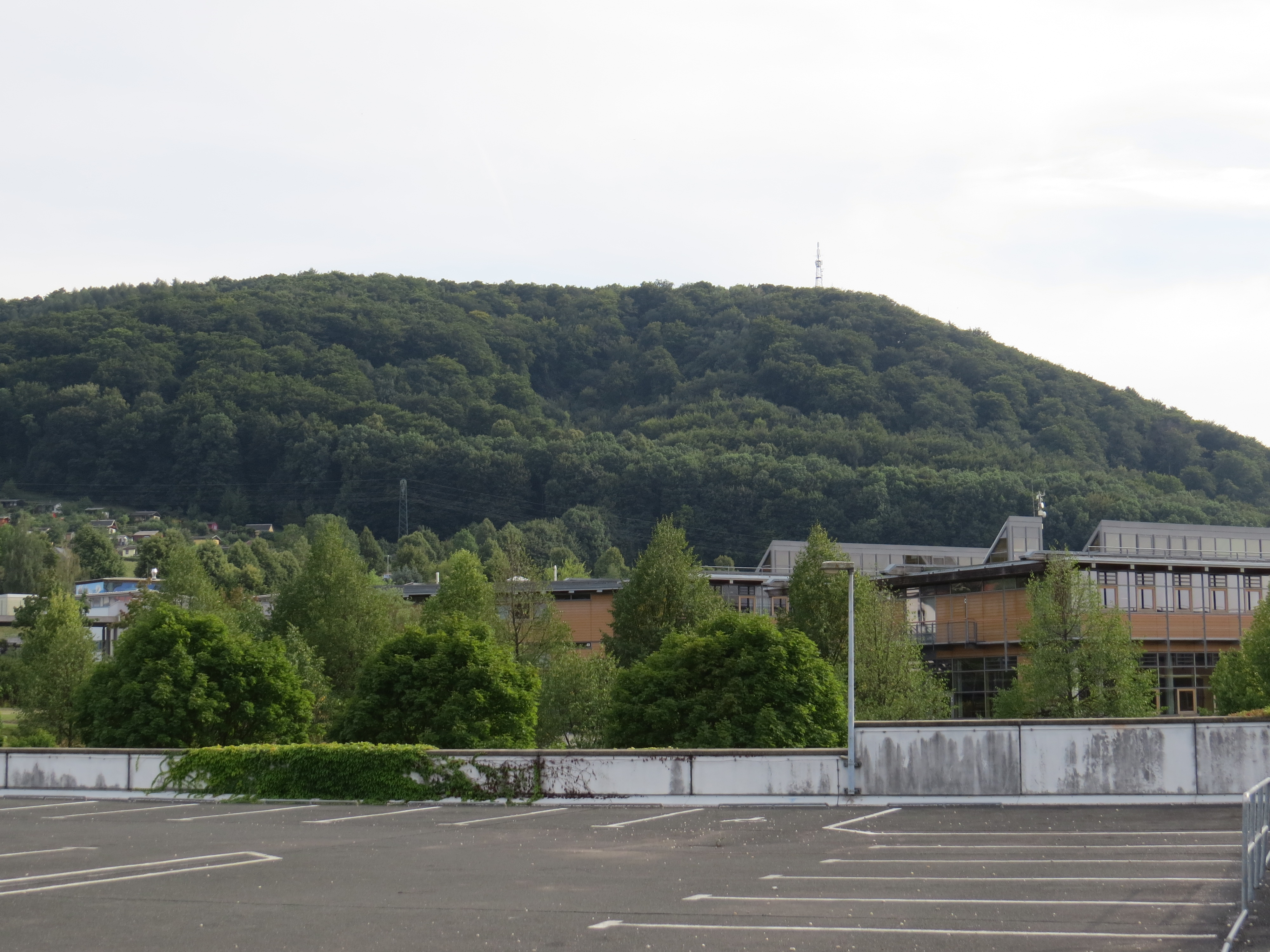 Blick vom Dach des Real-Supermarktes in Burgk zum Windberg, am linken Bildrand das Berufsschulzentrum.